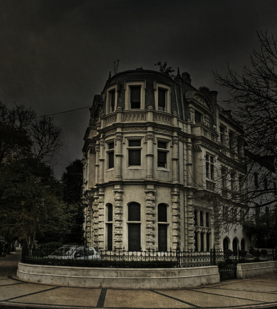 Mariscal R. Castilla 2906, esquina con Manuel Obarrio. Sección 15, Manzana 164, Parcela 18. Barrio Parque, Palermo, Buenos Aires, Argentina.